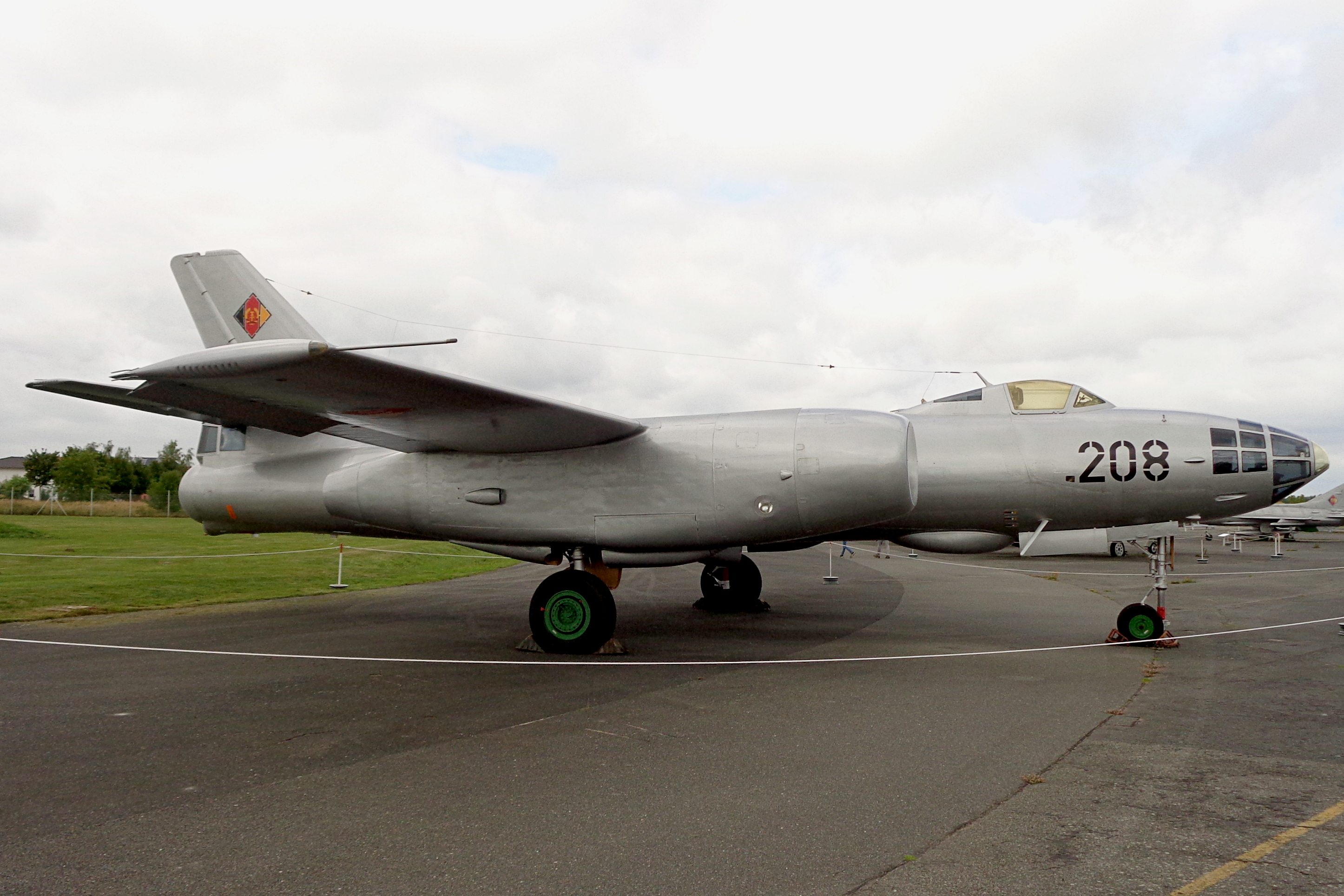 Ilyushin Il-28 en el MHM Gatow.